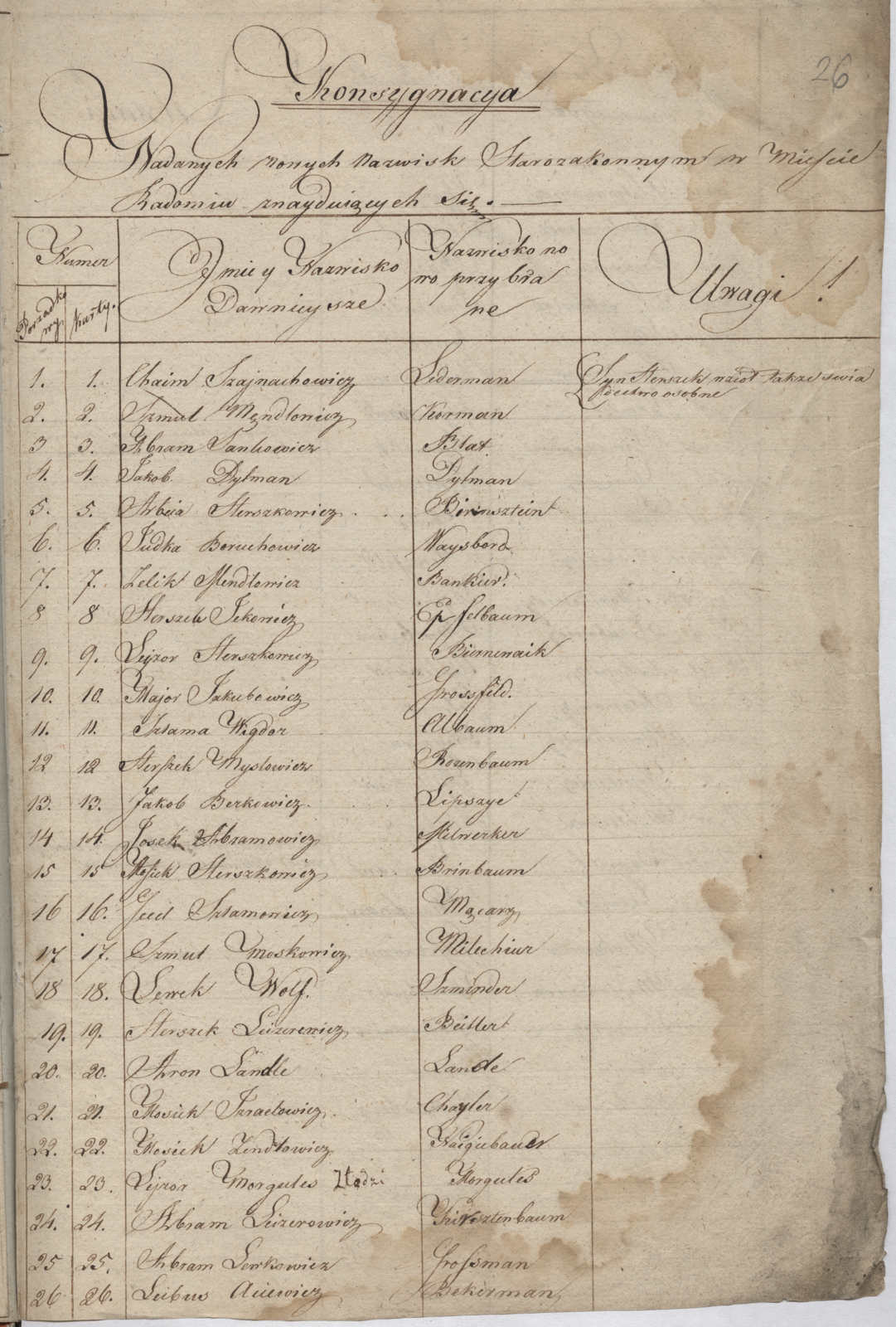 Karta z Archiwum Państwowego w Radomiu